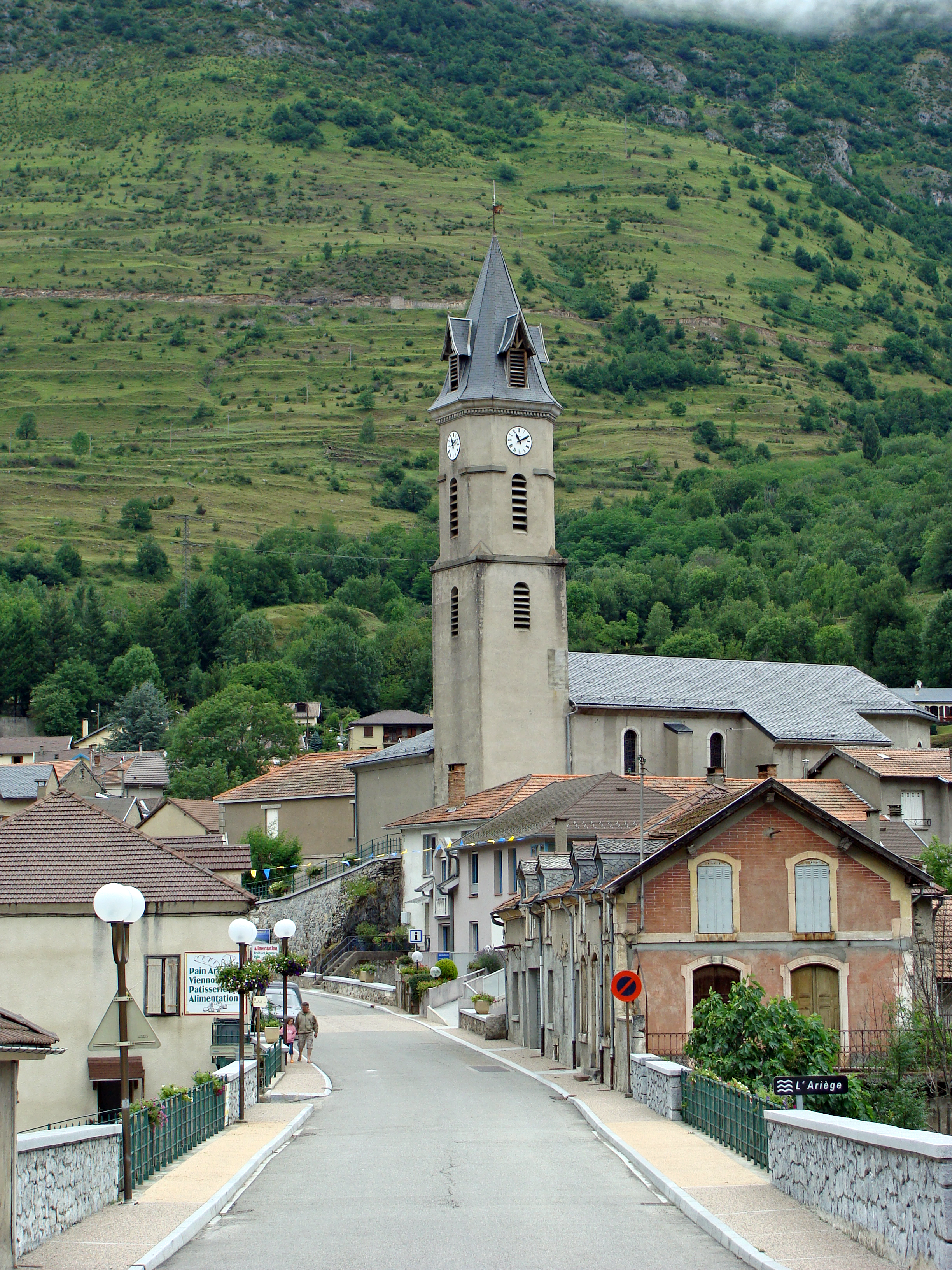 Luzenac, Ariège, Frankreich: Das Stadtzentrum.